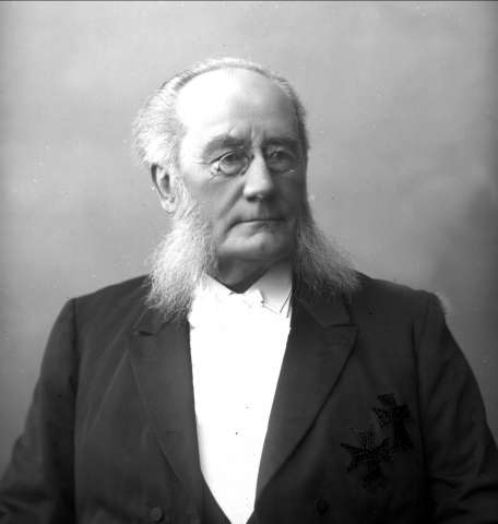 Advokat Jacob Thurmann Ihlen